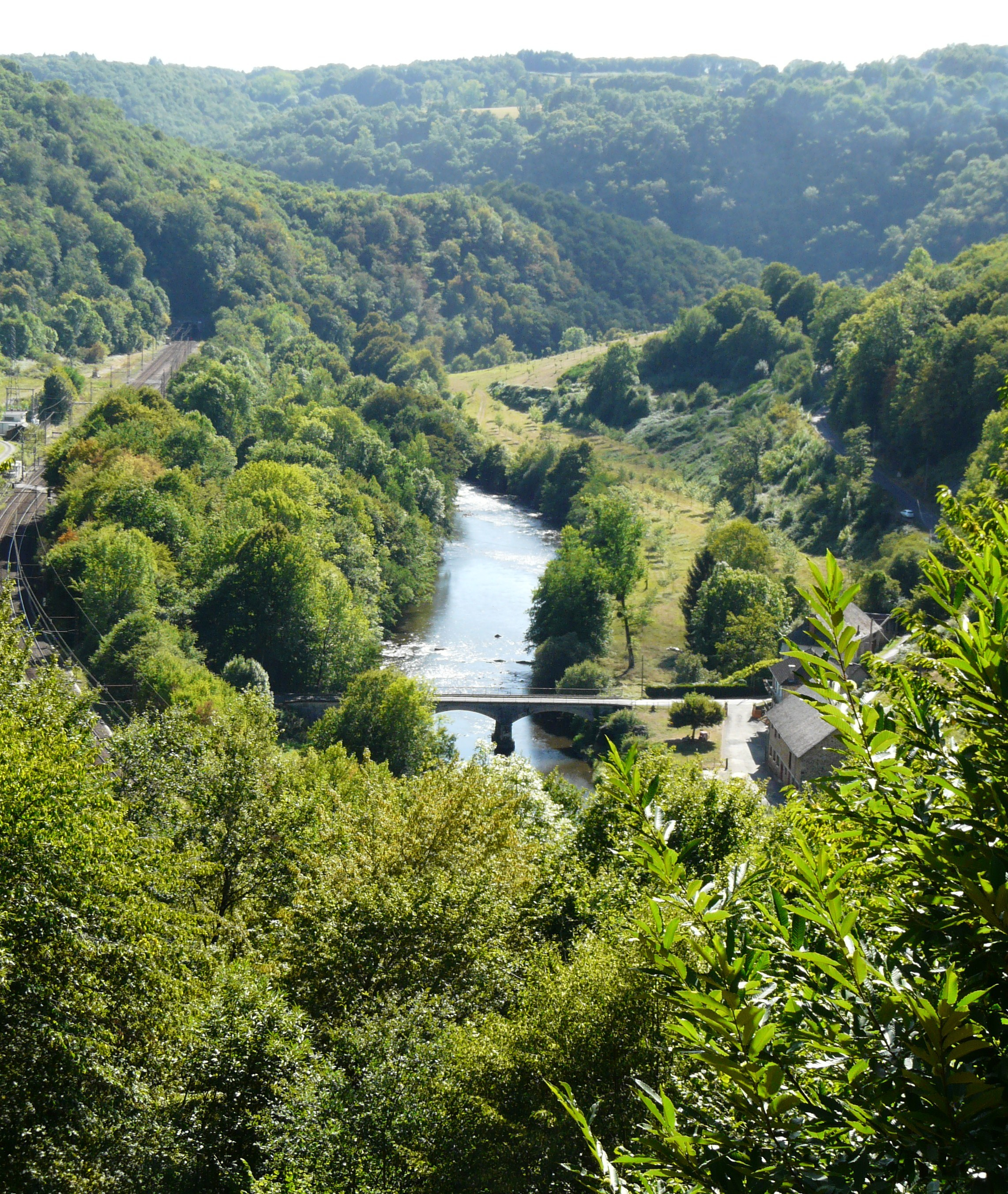 La Vézère au pont de Comborn, entre Estivaux à gauche et Orgnac-sur-Vézère à droite ; Corrèze, France. Vue prise en direction de l'aval depuis le belvédère d'Estivaux, le long de la route départementale 9E2.